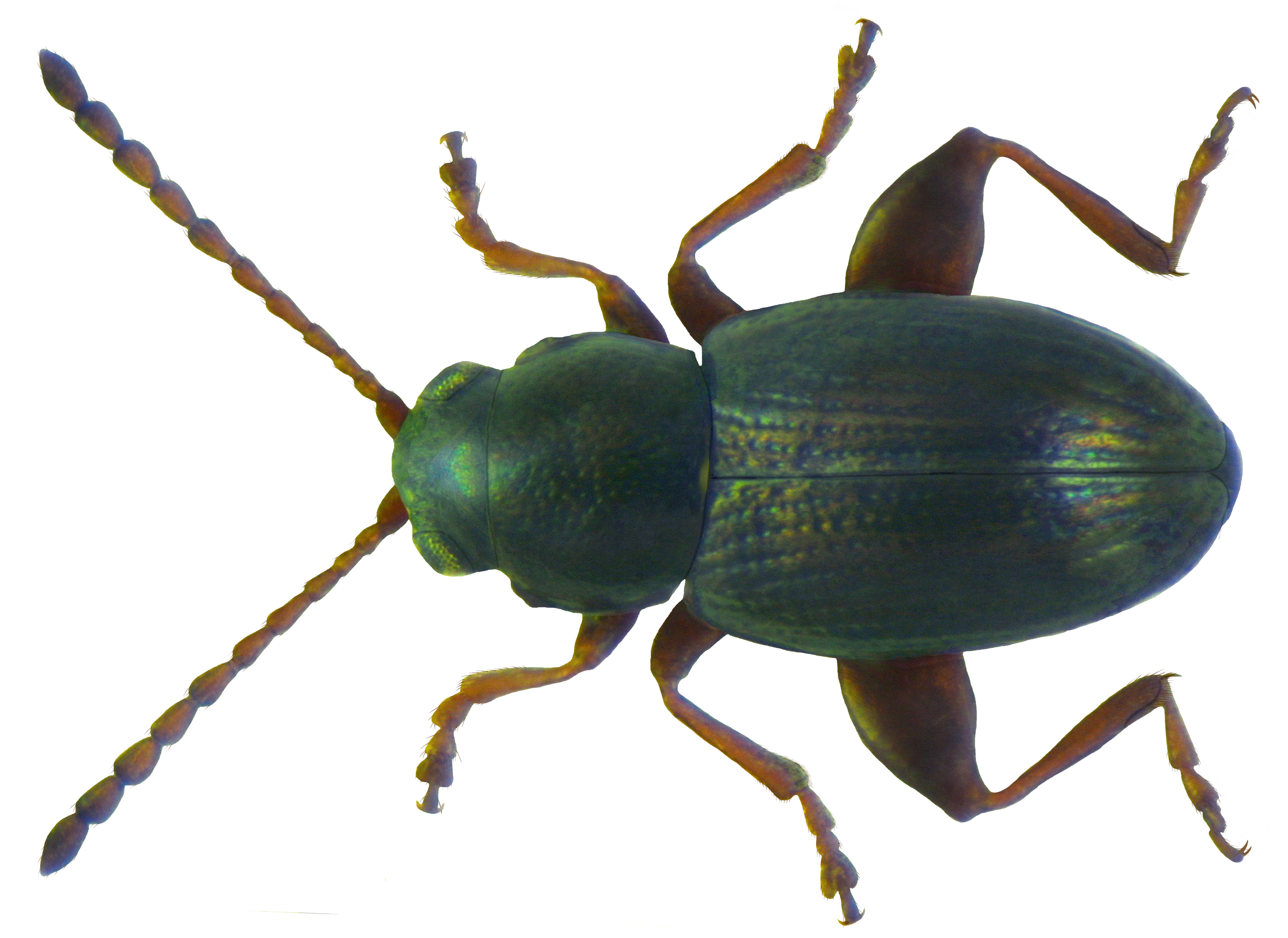 Batophila aerata (Marsham, 1802) Familie: Chrysomelidae Groesse: 1,7 mm Verbreitung: westliche Europa, Schweiz, Süddeutschland Oekologie: an Rubus- und Fragaria-Arten Fundort: Germania, Rheinland-Pfalz, Kirn, Nahetal leg.det. K.Renner, 1989 Photo: U.Schmidt, 2011